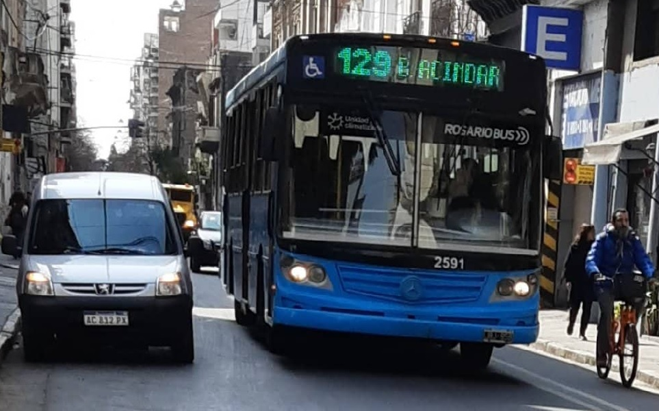 Mercedes-Benz O-500 de la empresa Rosario Bus, explotadora de la línea 129